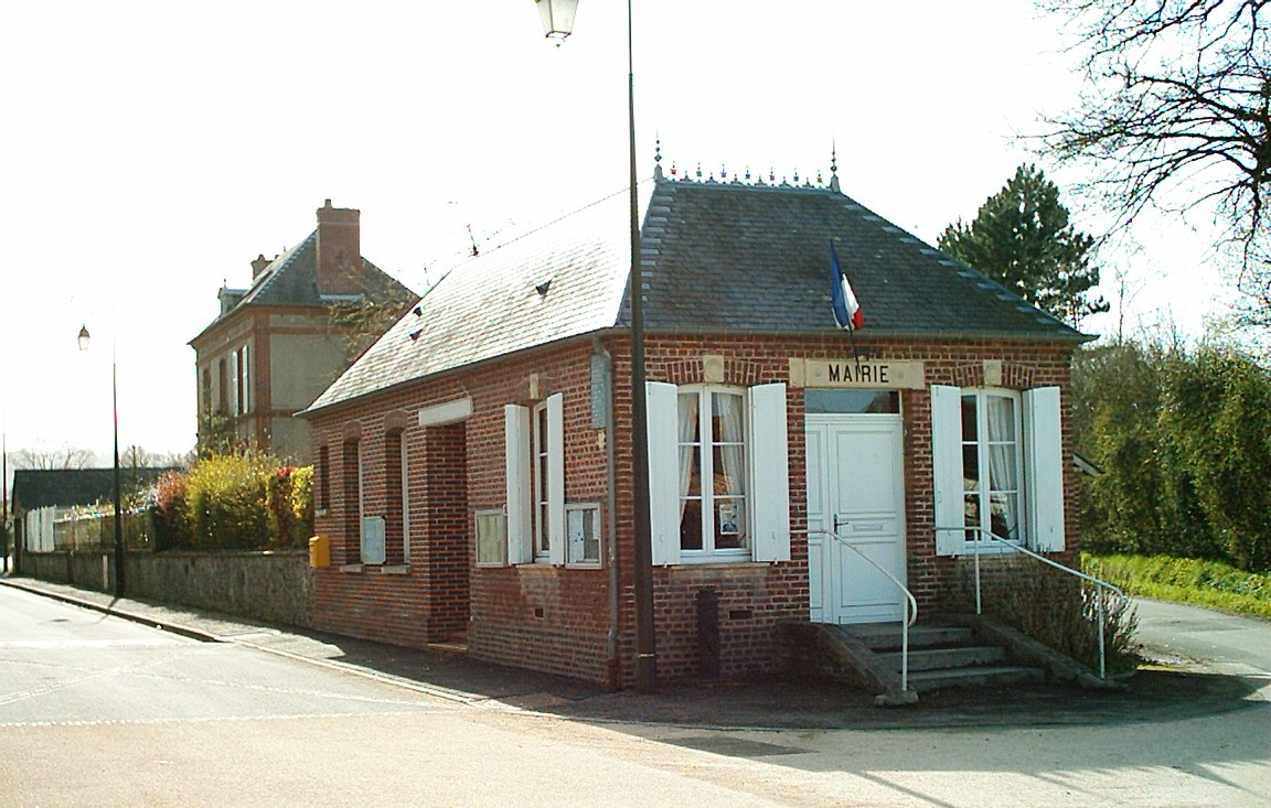 Mairie de Saint-Etienne-la-Thillaye 14950